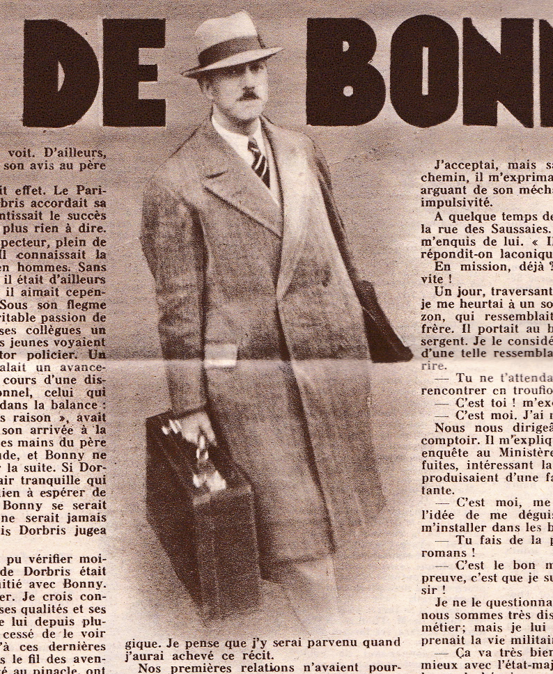 L'inspecteur Pierre Bonny, dans une double page du magazine Détective 13 décembre 1934.